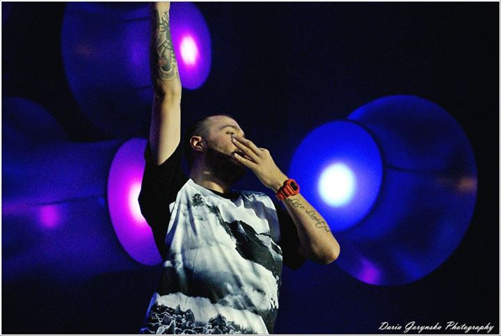 Producent muzyczny Robert M, 28.08.2011 - Bydgoszcz Hity na Czasie - Zakończenie lata 2011 - Myślęcinek - Leśny Park Kultury i Wypoczynku